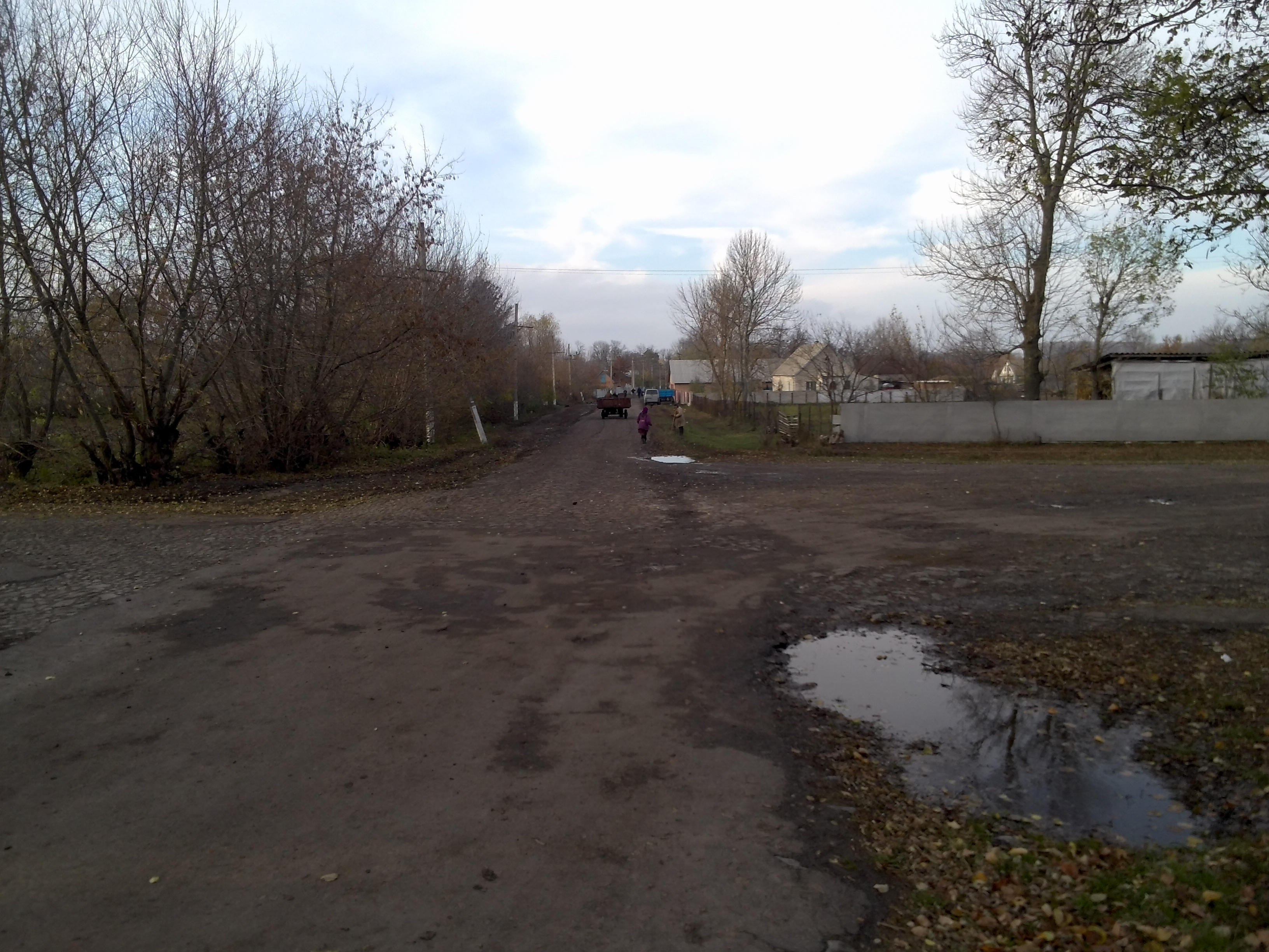 с. Вербівка